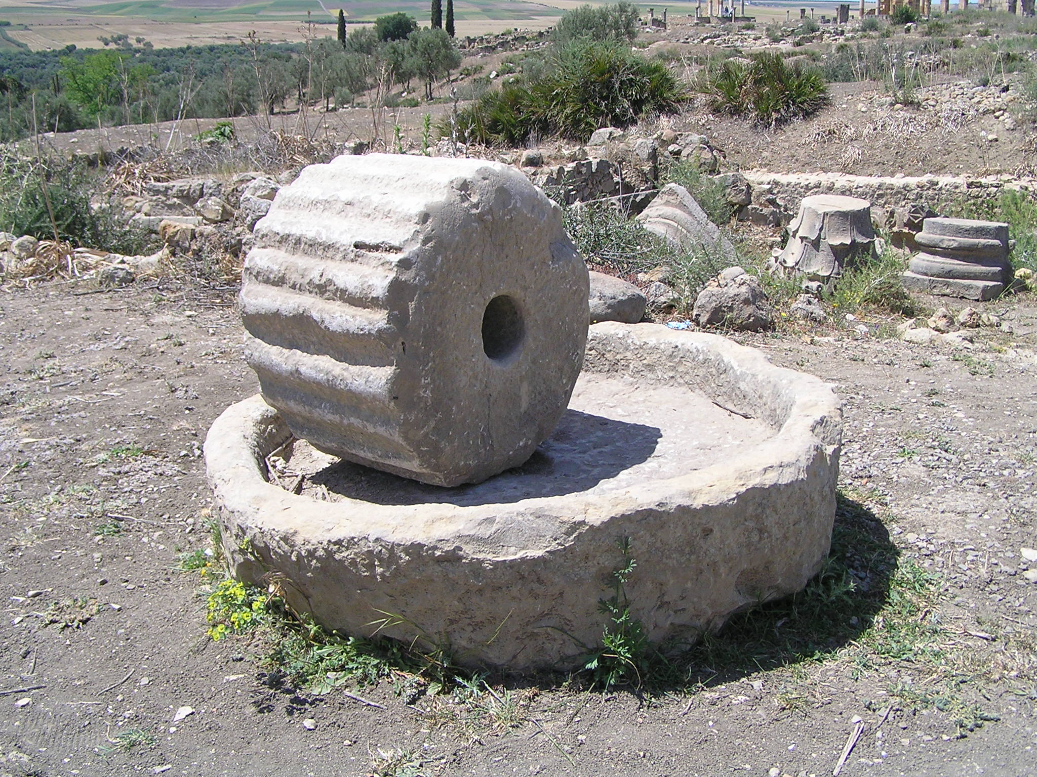 meule à volubilis au Maroc